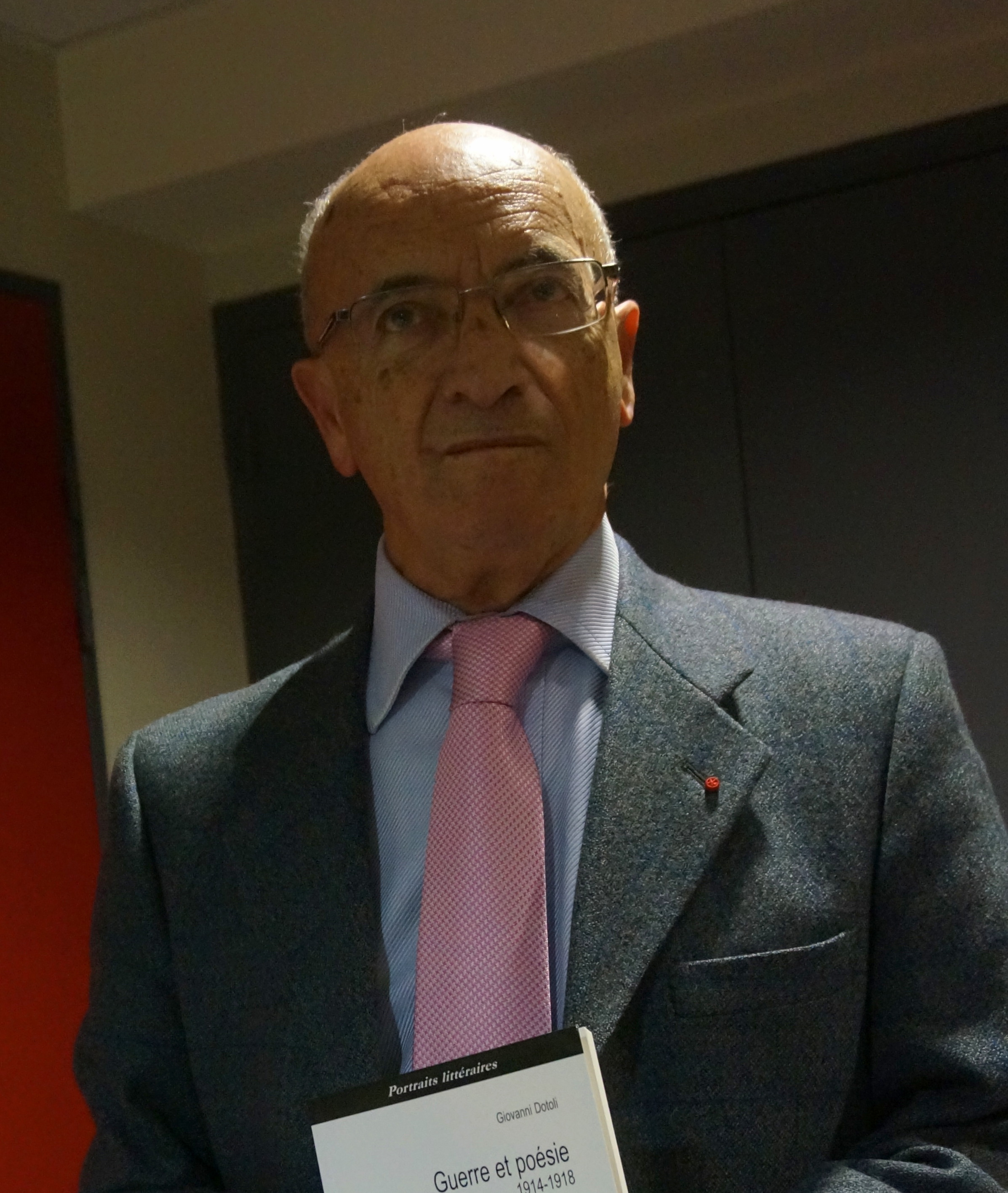 Giovanni_Dotoli_en conférence_à la bibliothèque Reims_Carnegie.